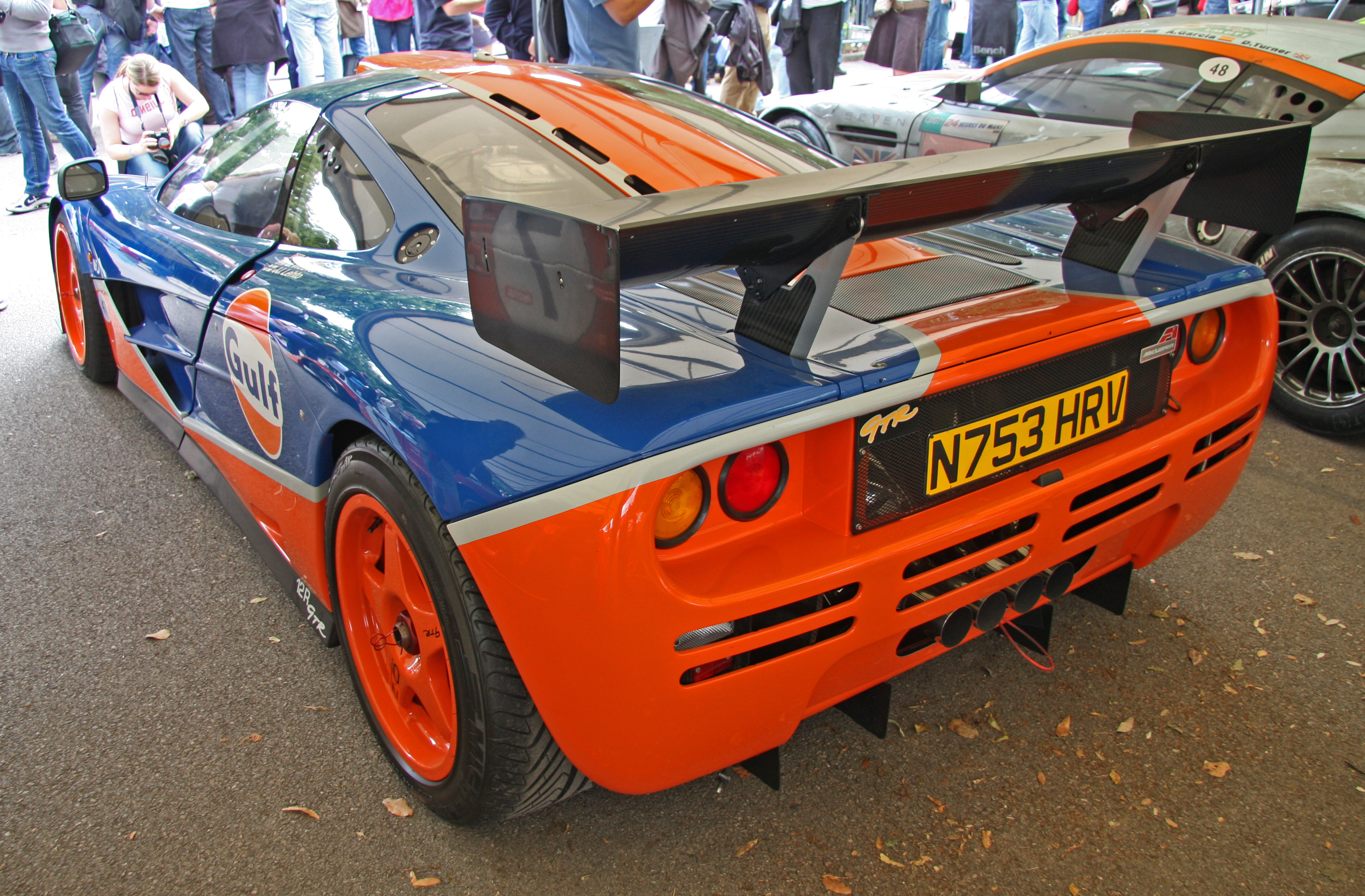 Built 1995. 6.1 litre V12